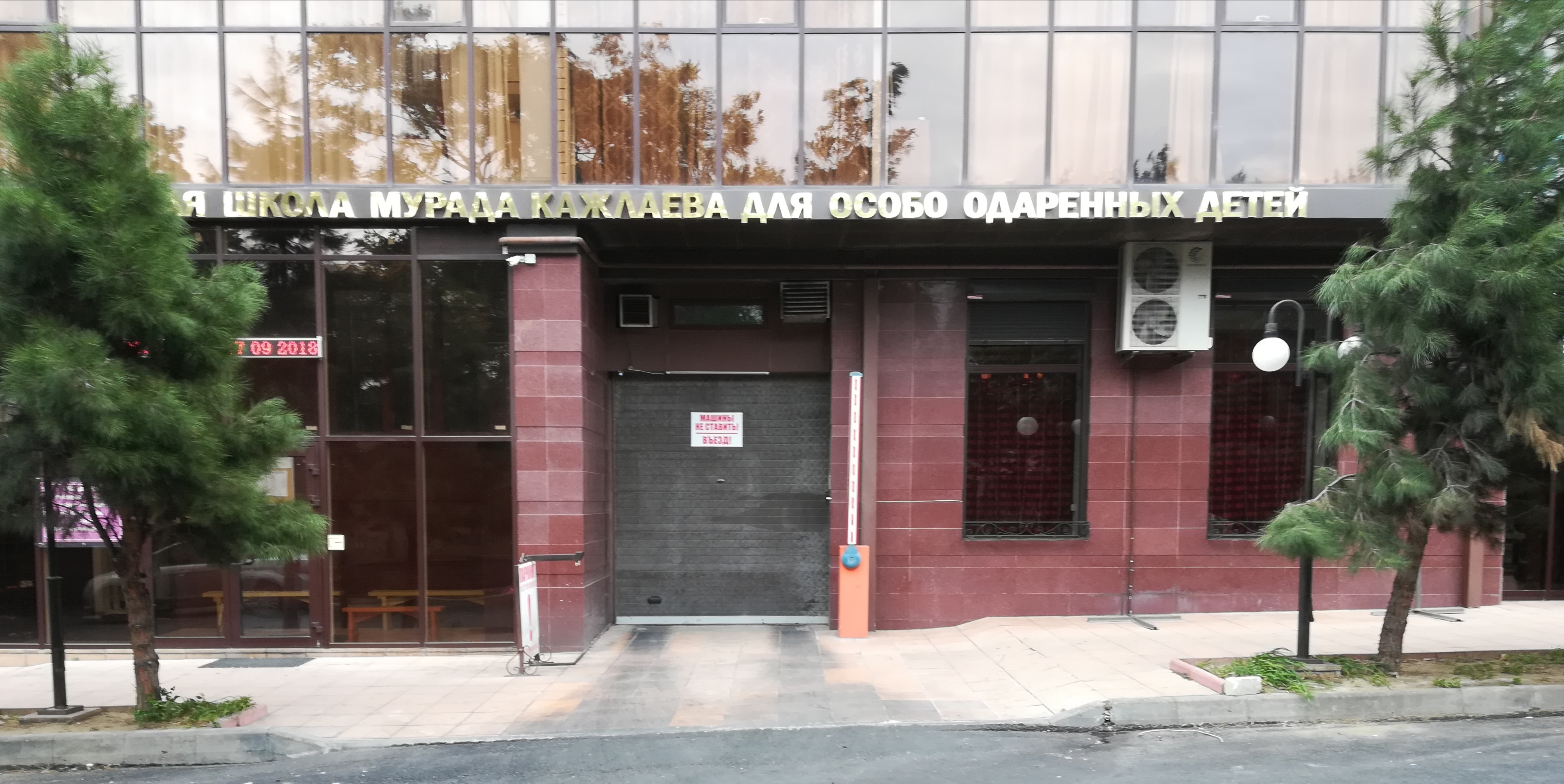 Махачкала